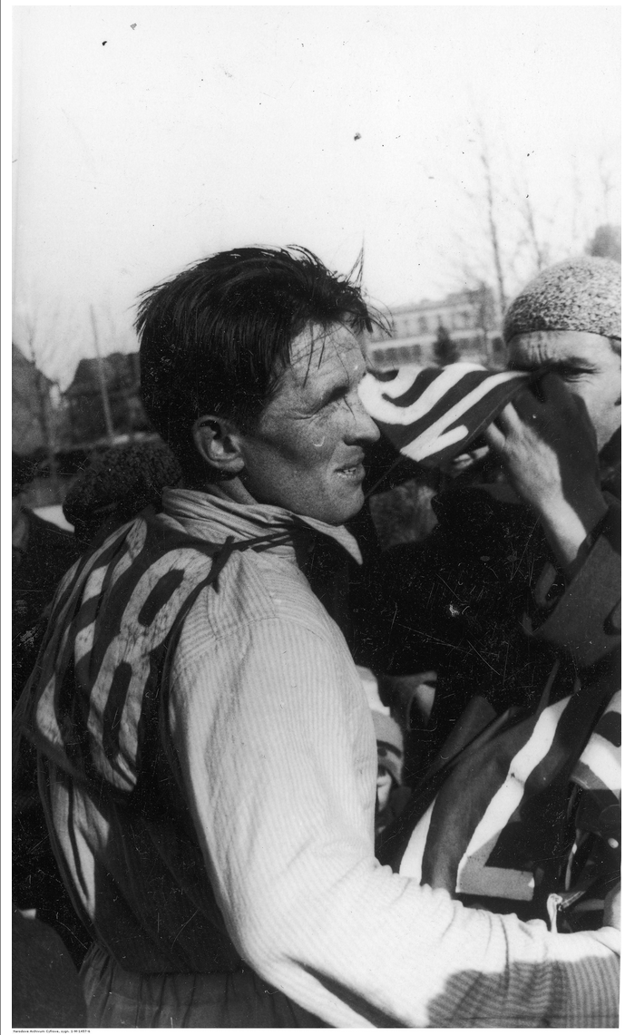 František Šimůnek lors des championnats de Pologne en 1934.